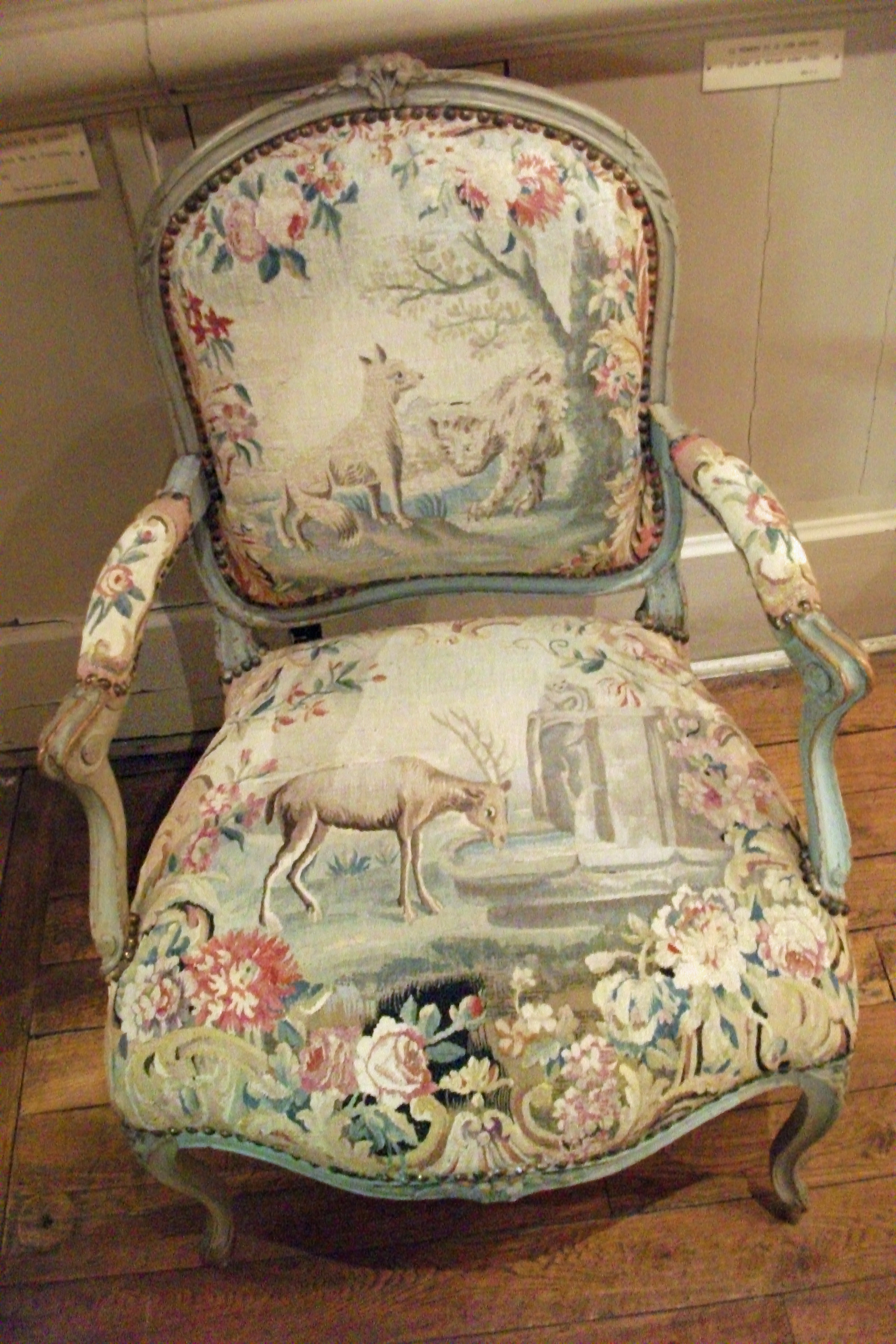 Le renard et le lion malade, Le cerf se voyant dans l'eau, fauteuil provenant d'un lot de huit se situant au Château de Sarry exposé au musée de Châlons-en-Champagne.